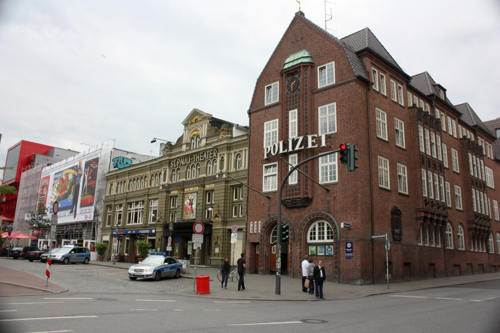 Die Davidswache und das St. Pauli Theater